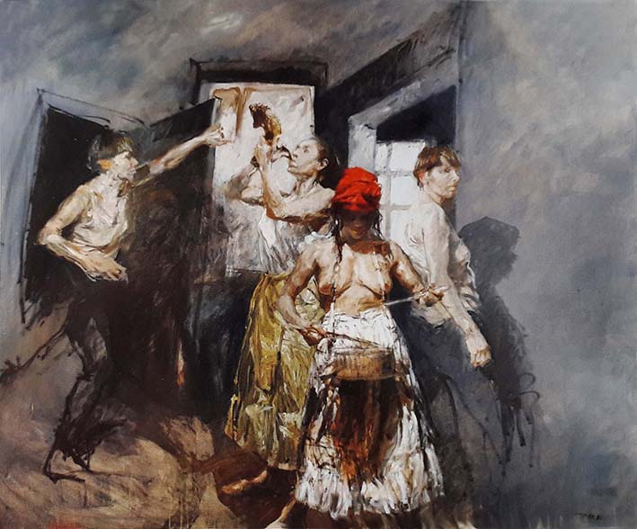 Serie :Variationen über “Die schwarzen Zimmer“, Hommage an Karl Hofer, Nr. 1, Rotes Kopftuch, 1995, 130 x 155 cm, Öl auf Leinwand, Bez. u.r. “Timner 95”